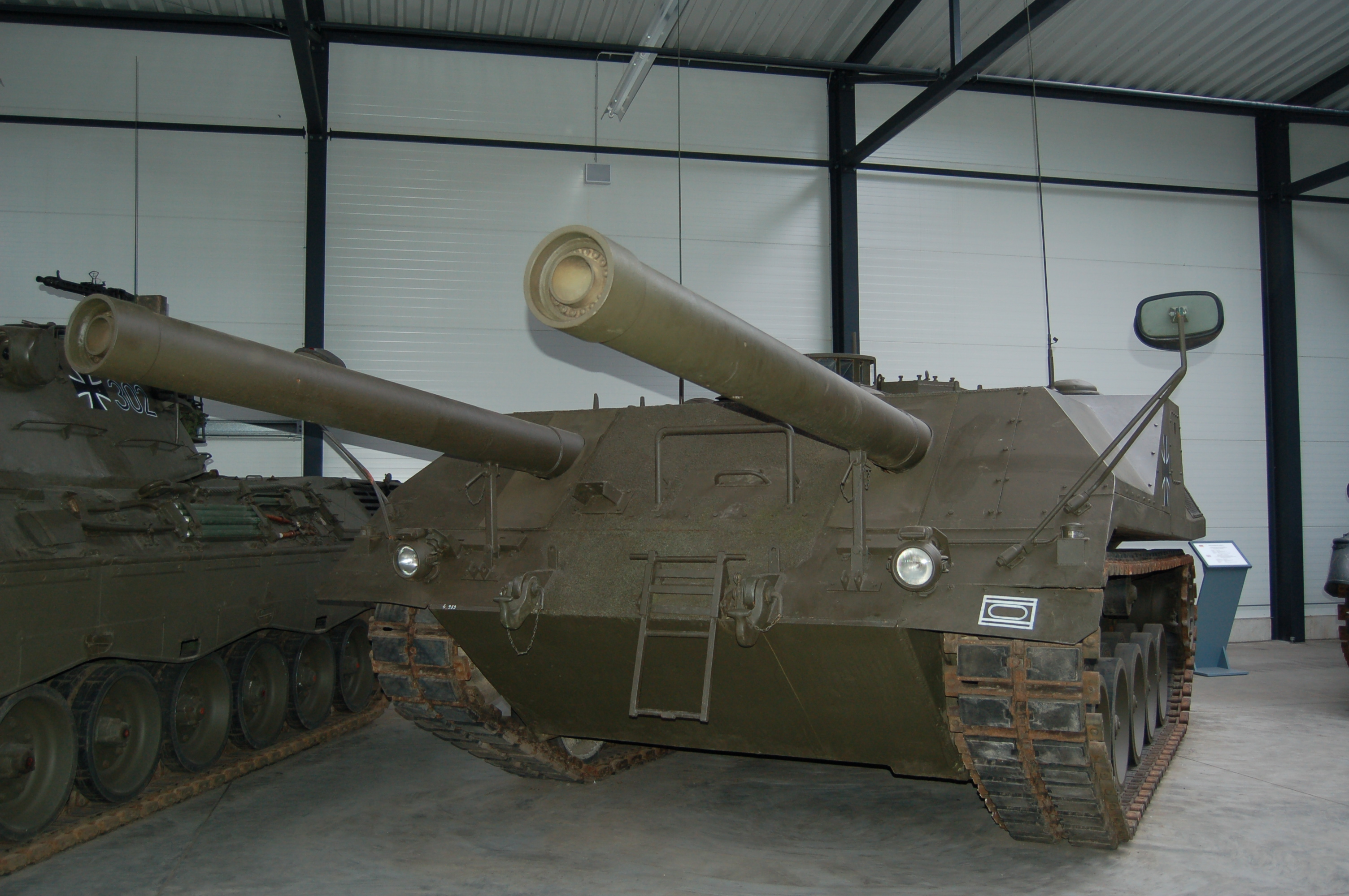 Gefechtsfeld-Versuchsträger GVT 04 (Doppelrohr-Kasemattpanzer)